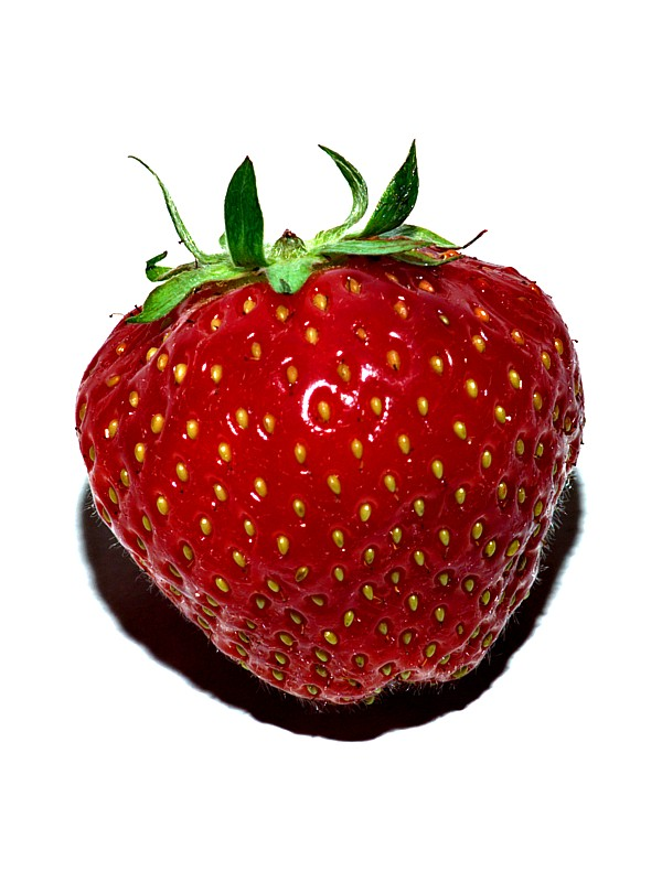 Eine Erdbeere. / A strawberry.